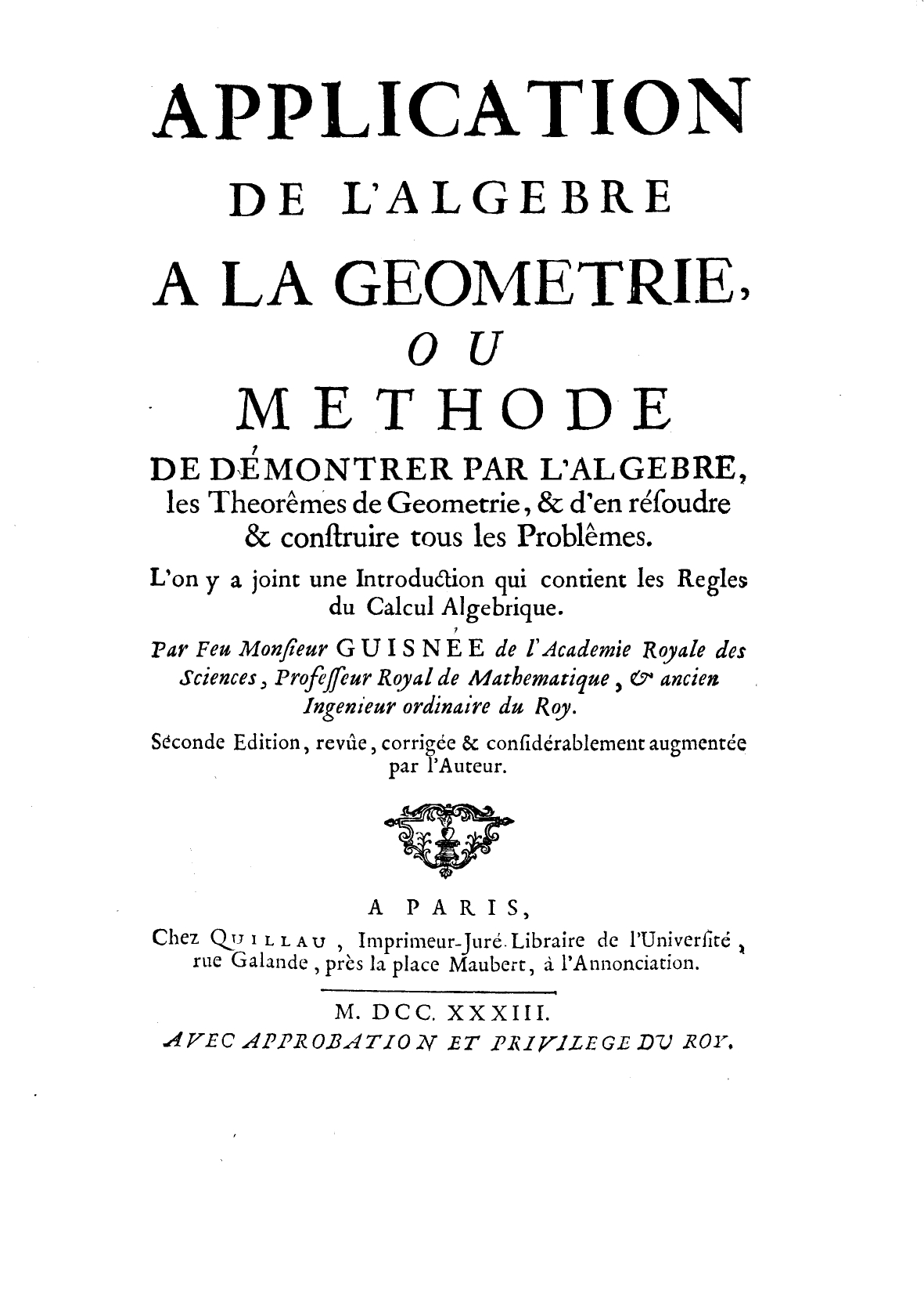 Application de l'algebre a la geometrie, ou Methode de démontrer par l'algebre, les theorêmes de geometrie, & d'en résoudre & construire tous les problêmes. L'on y a joint une Introduction qui contient les regles du calcul algebrique. Par feu monsieur Guisnée .... - A Paris : chez Quillau, imprimeur-juré libraire de l'Université, rue Galande, près la place Maubert, à l'Annonciation, 1733. - [12], LXVI, 256, [2] p., VIII c. di tav. calcografiche ripiegate : ill. ; 4º .